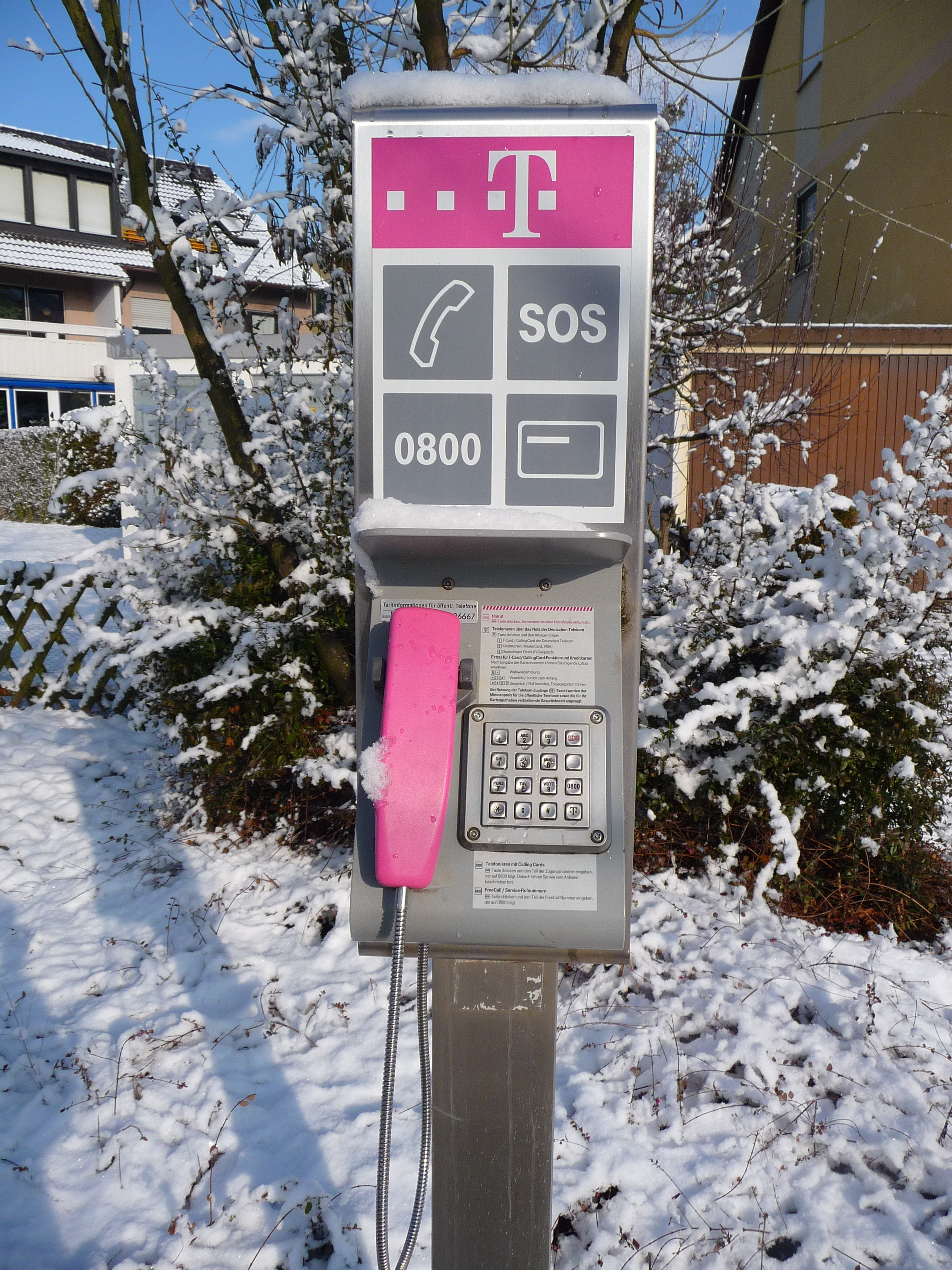 Basistelefon der DTAG (spezielle Form des Öffentlichen Telefons). Hier kann NICHT mit Telefon- oder Kreditkarte telefoniert werden; Notrufe sind kostenfrei möglich, ebenso Anrufe zu kostenfreien Nummern oder mit Calling-Cards